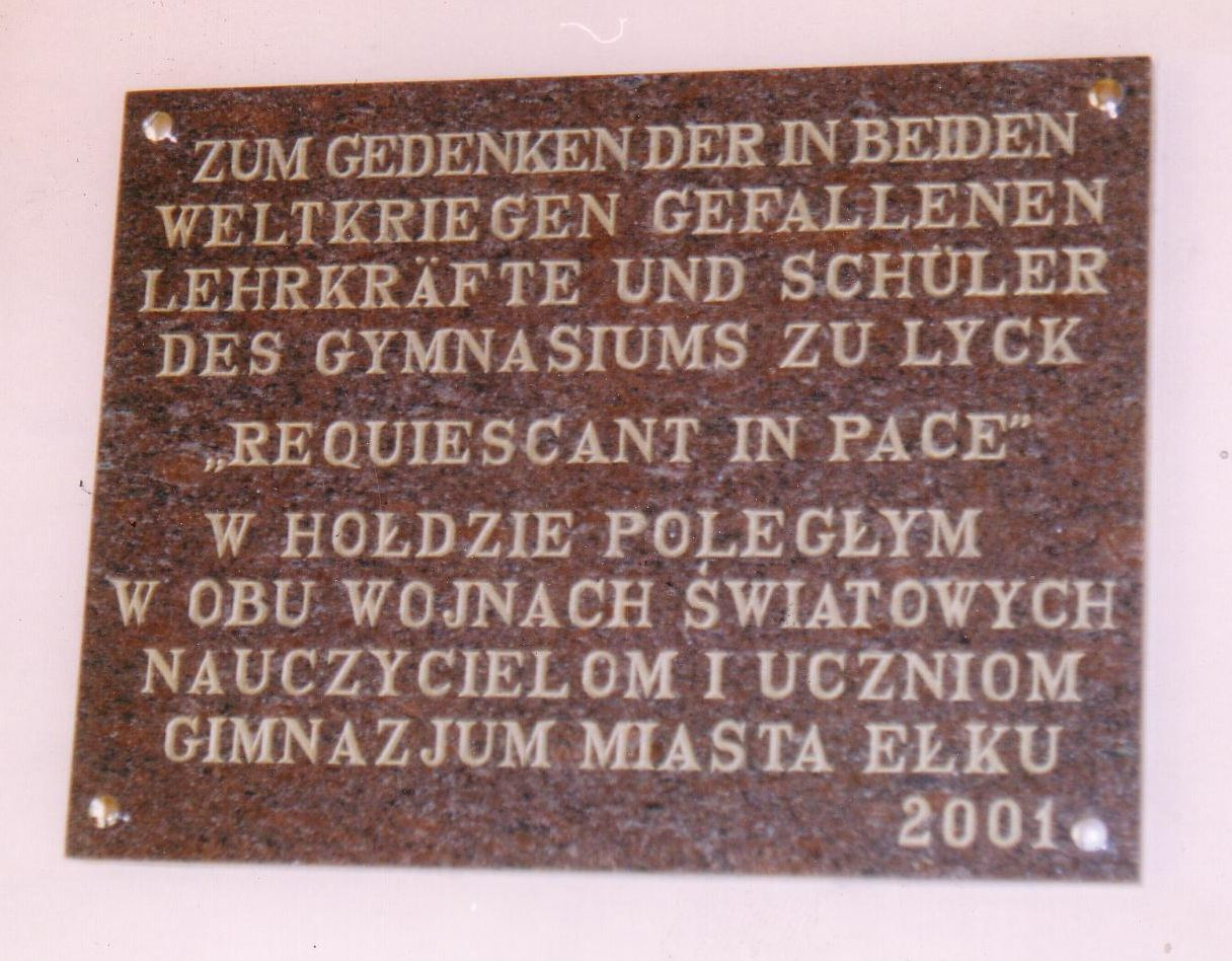 Fotografie der Gedenktafel im Gymnasium Ełk zur Erinnerung an die gefallenen Schüler